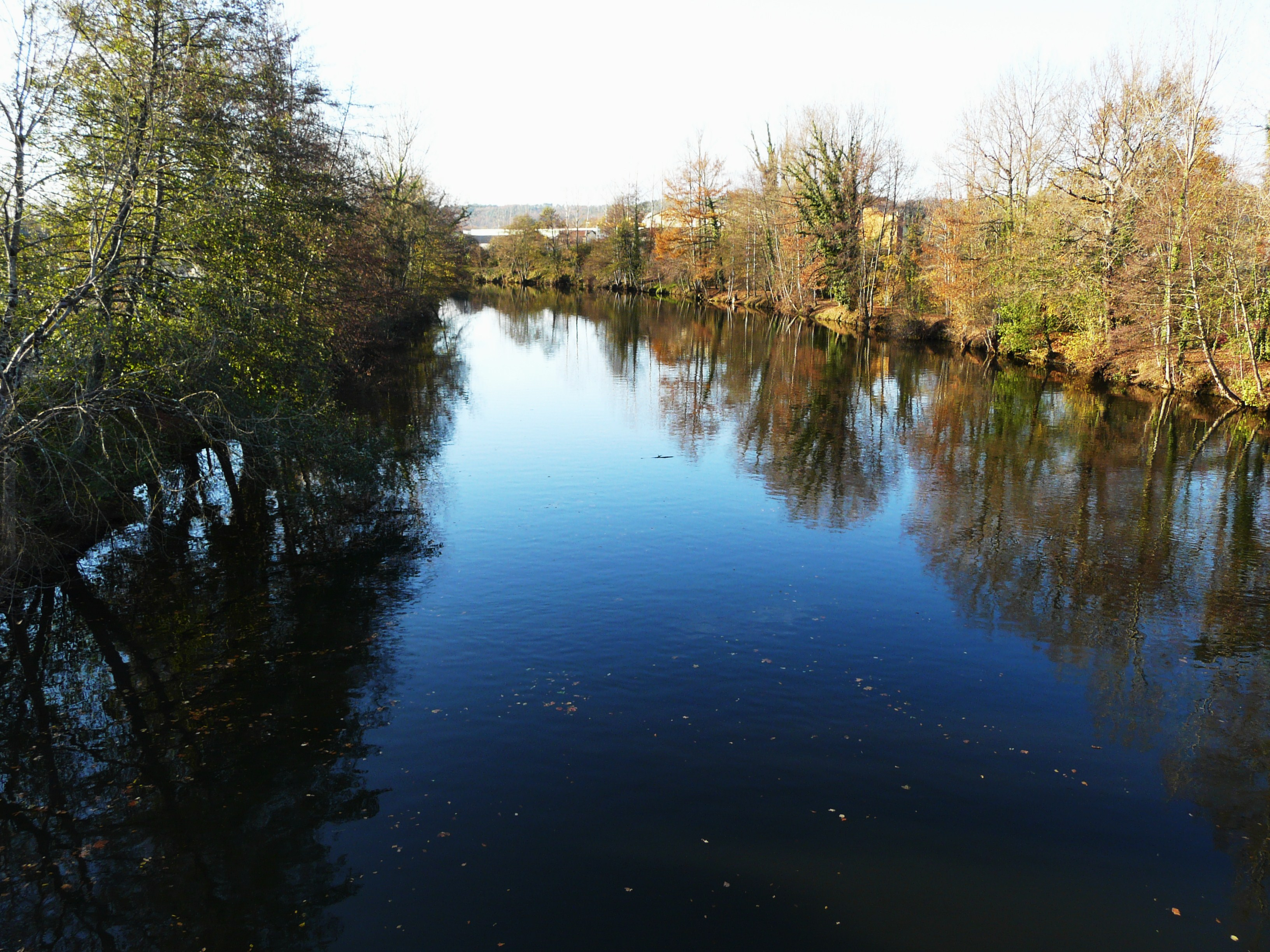 L'Isle au pont de la RD 710E, entre la zone commerciale et le bourg, Marsac-sur-l'Isle, Dordogne, France